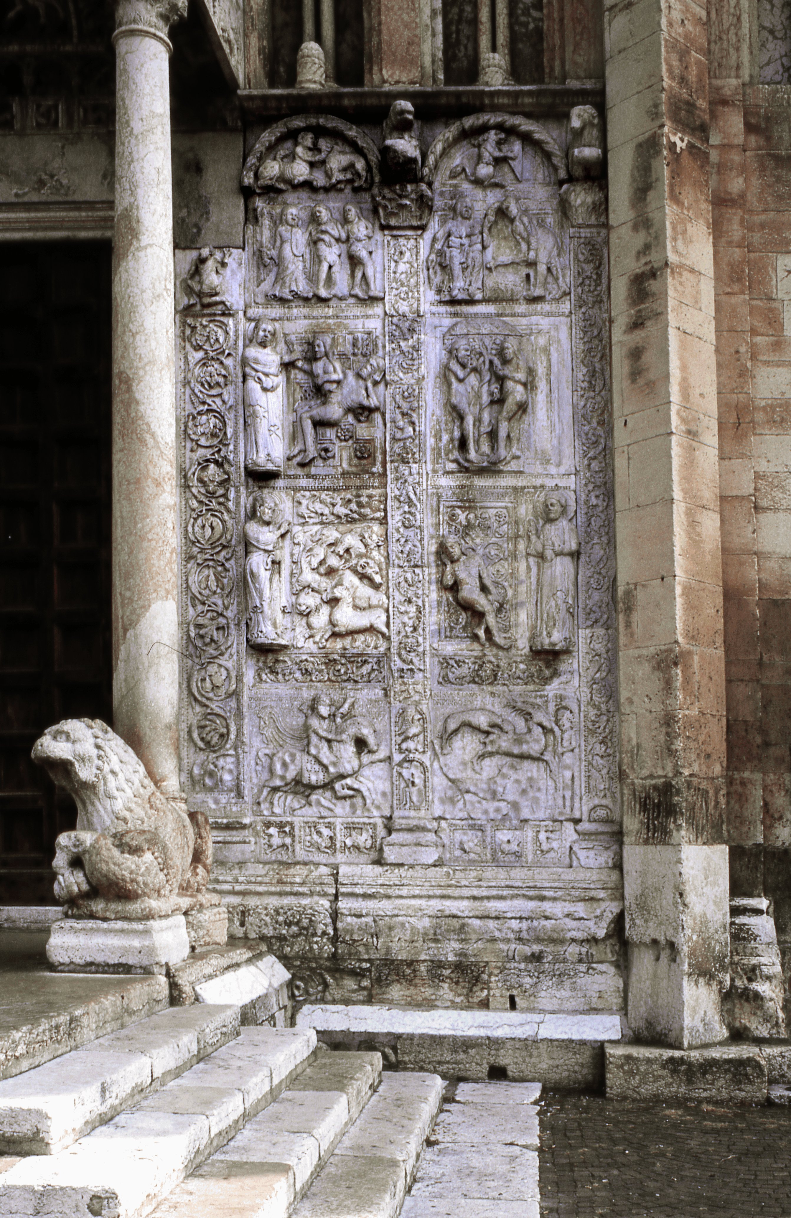 San Zeno Maggiore: facade reliefs by Nicolò